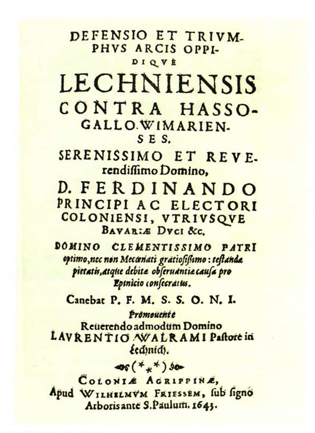 Lechenich, Titelseite des Buches „DEFENSIO ET TRIVMPHVS“, aus dem Jahr 1643 (Epos zur Belagerung der Stadt)